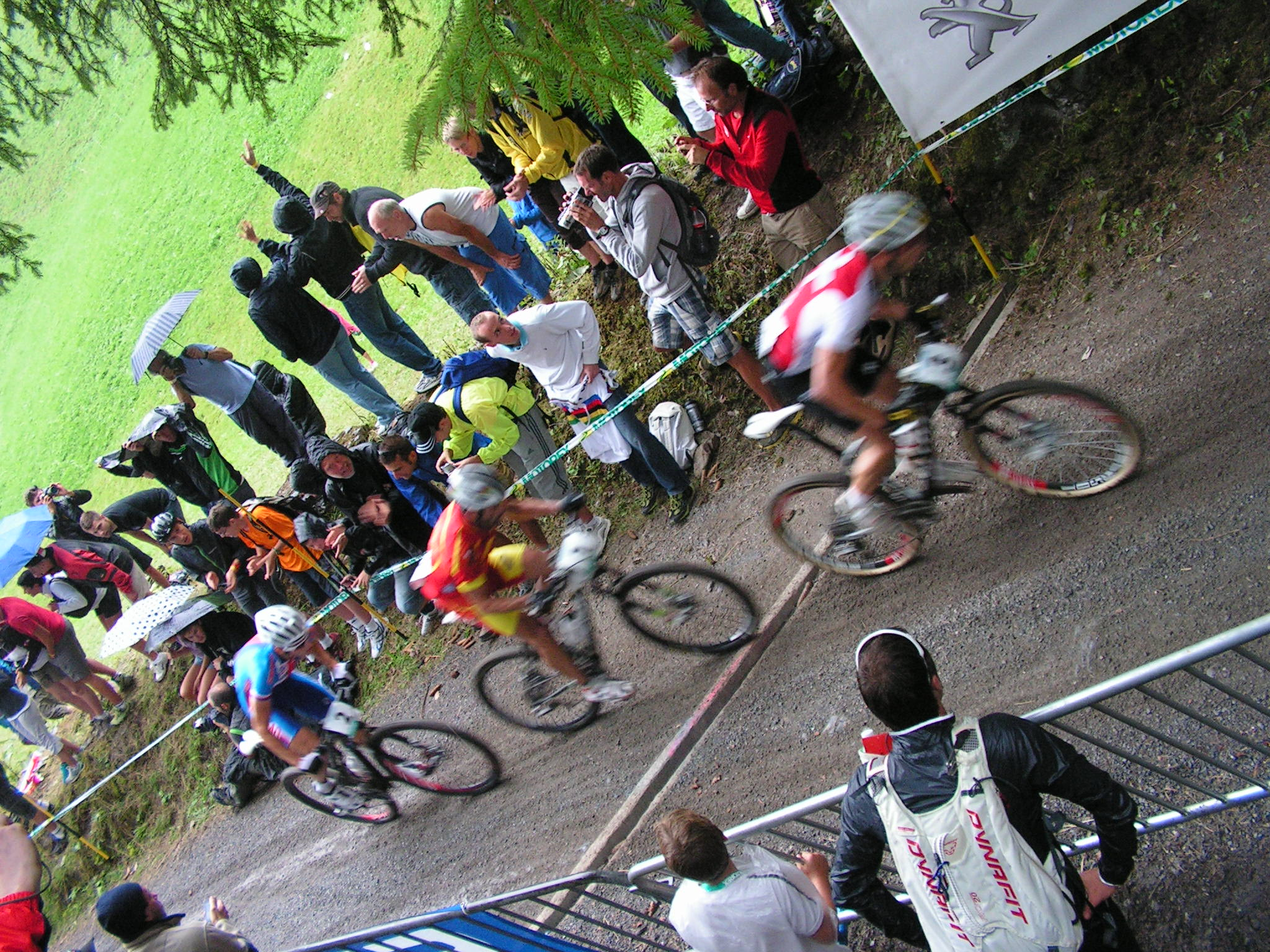 Photo réalisée lors de la dernière journée des championnats du Monde de VTT et de Trial à Champéry. Course VTT Cross Country homme et femme